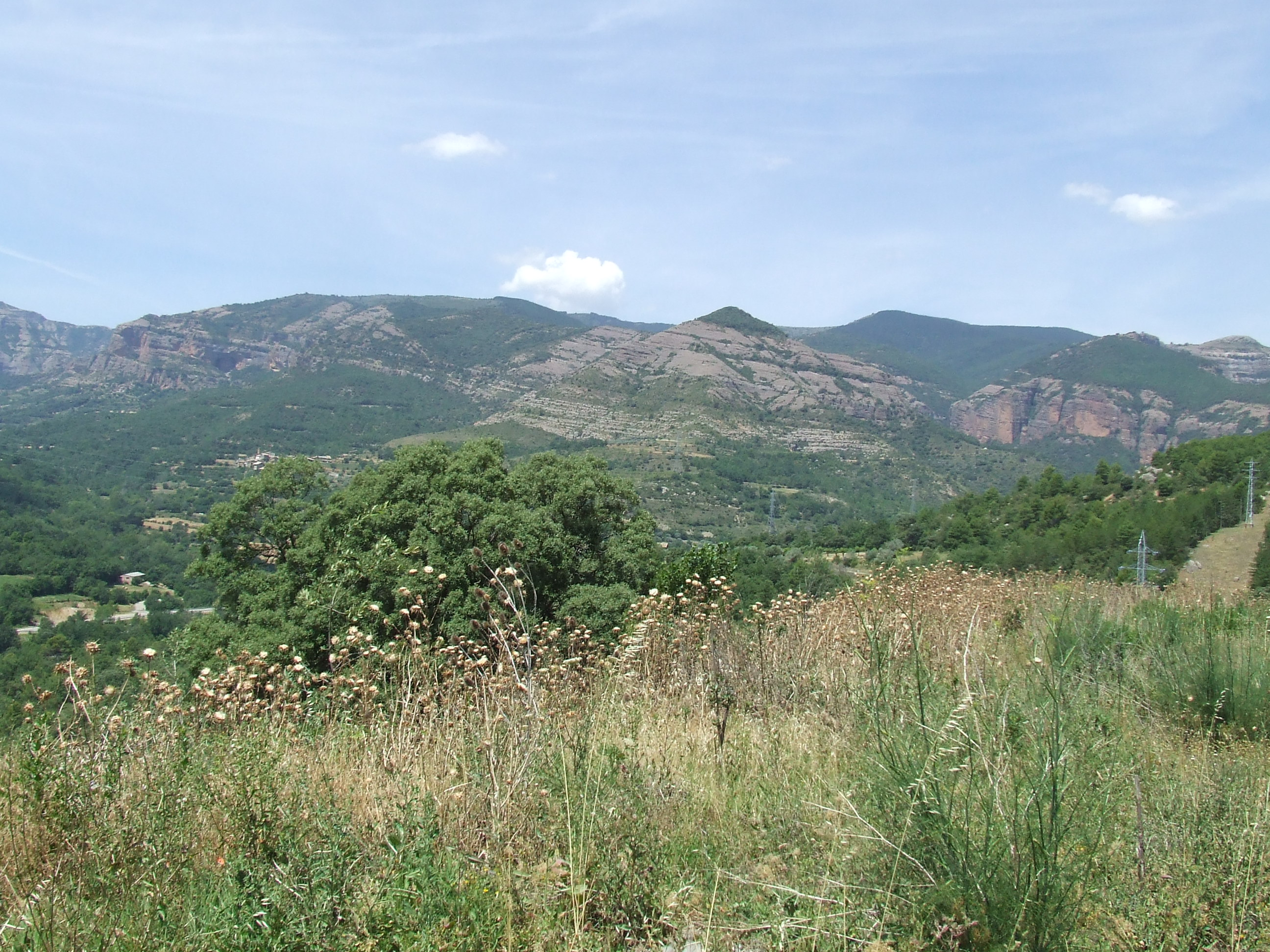 Tossal dels Corbs, a Erinyà (Toralla i Serradell, Conca de Dalt, Pallars Jussà)